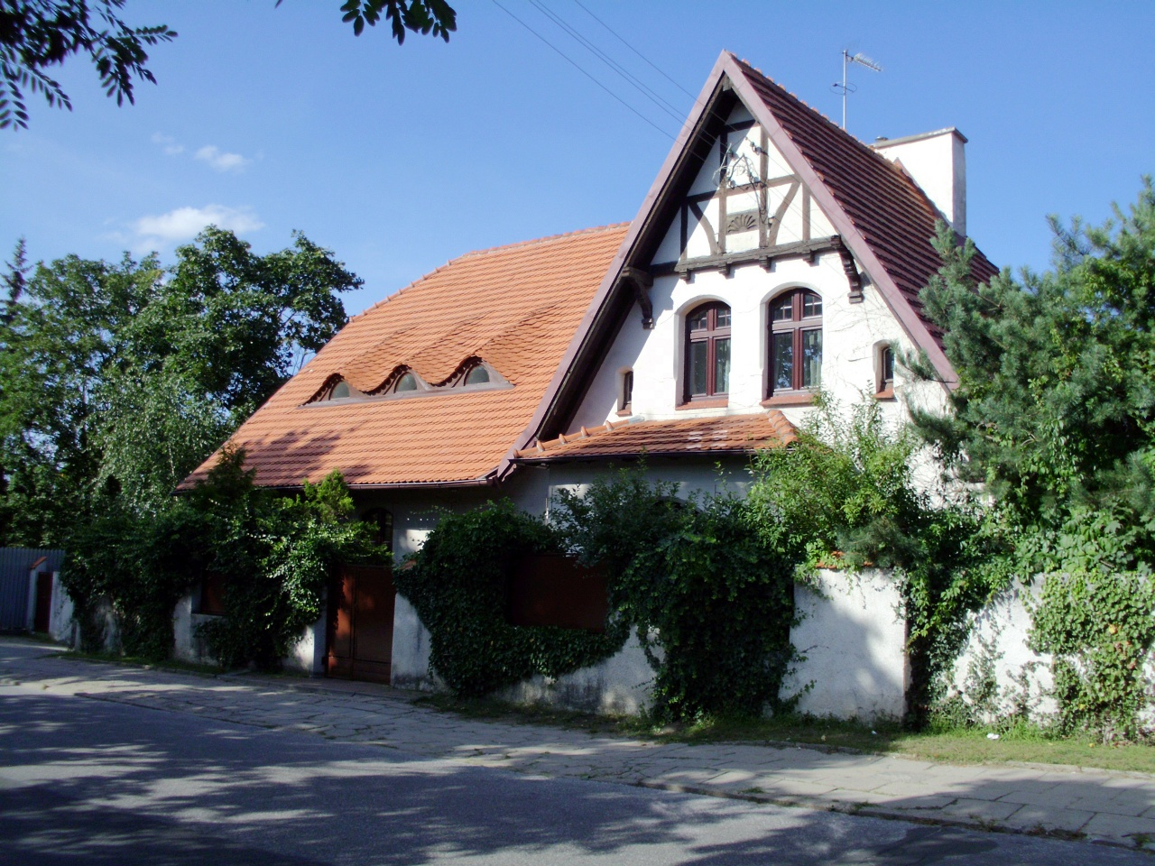 ochronka, ob. dom mieszkalny, 1906 Bydgoszcz, ul. Bełzy 9